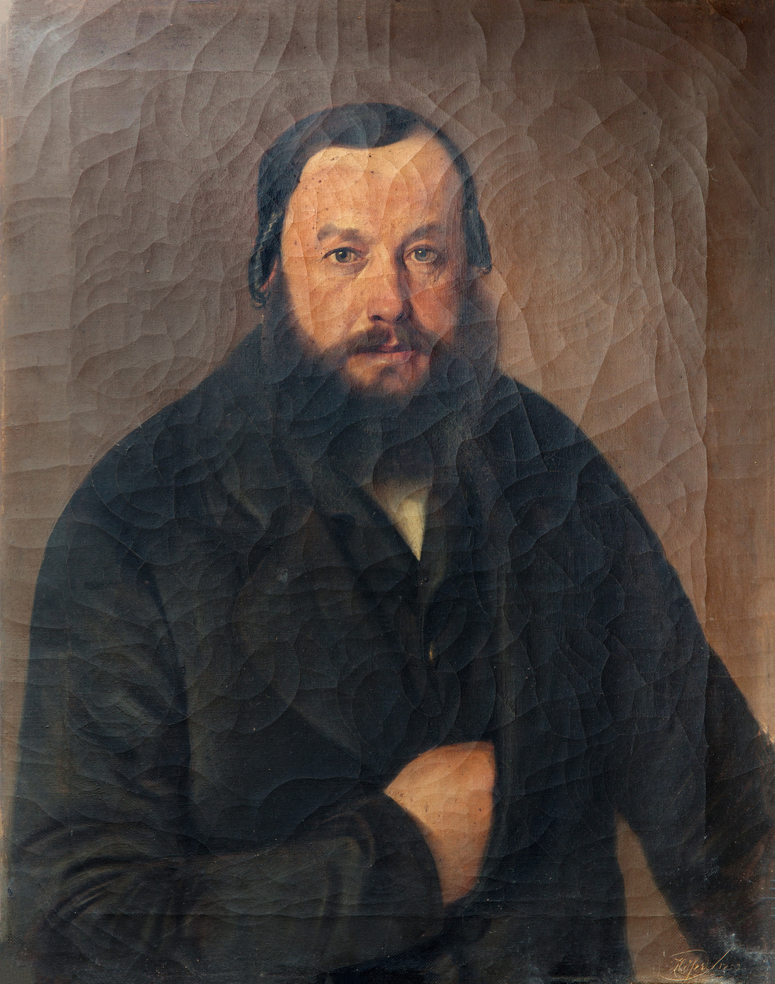 Sensengewerke und Hammerwerksbesitzer Johann Michael Franz Seraphin Zeitlinger (* 27. Dezember 1830 in Hausmanning; † 17. Oktober 1902 in Inzersdorf im Kremstal). Michael Zeitlinger stammte aus dem Sensenwerk Blumau und war Hammerwerksbesitzer in Inzersdorf und Sensengewerke in Kindberg. Gemälde signiert und datiert Höfer 1853.